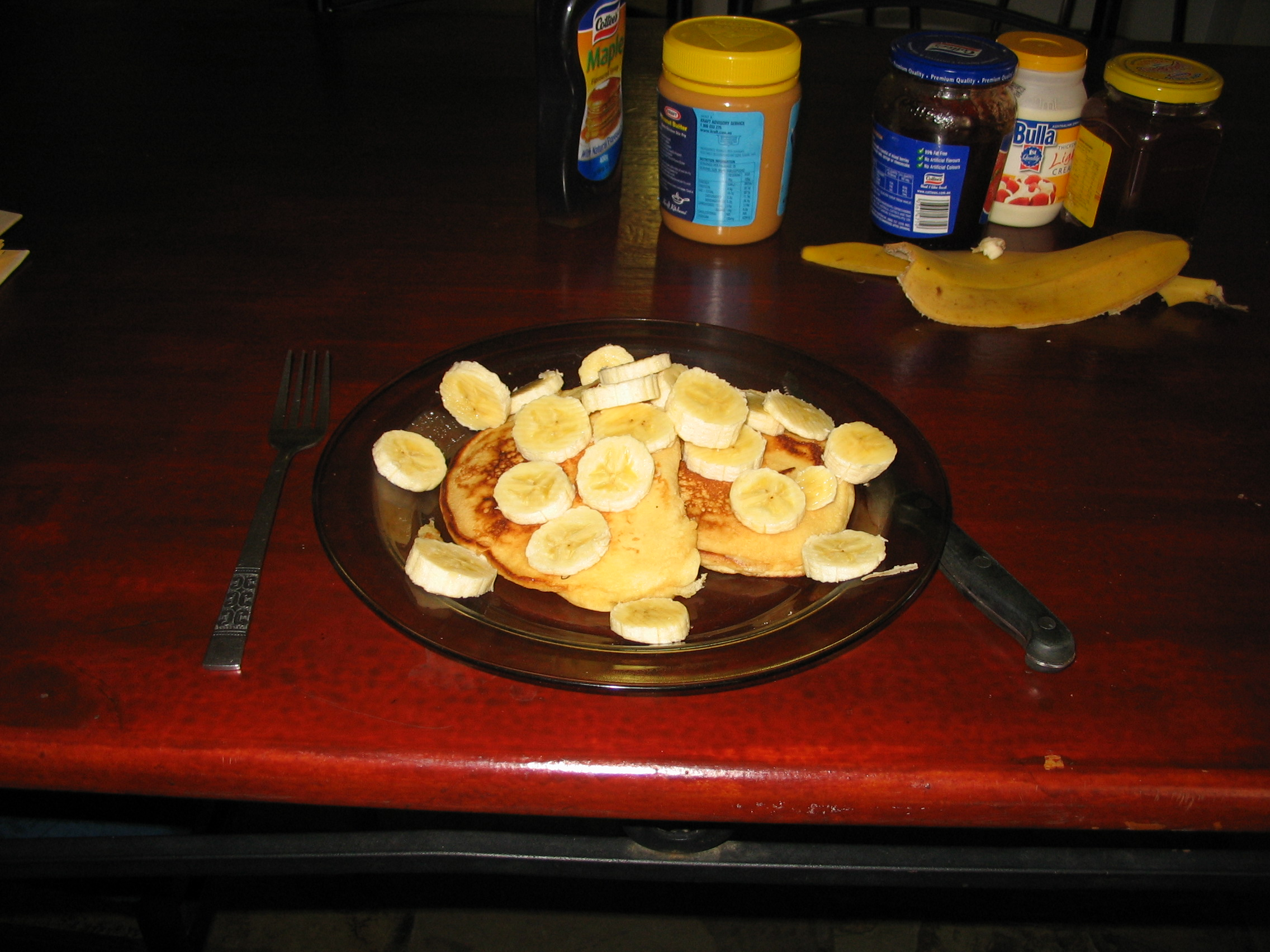 Banana Pancakes